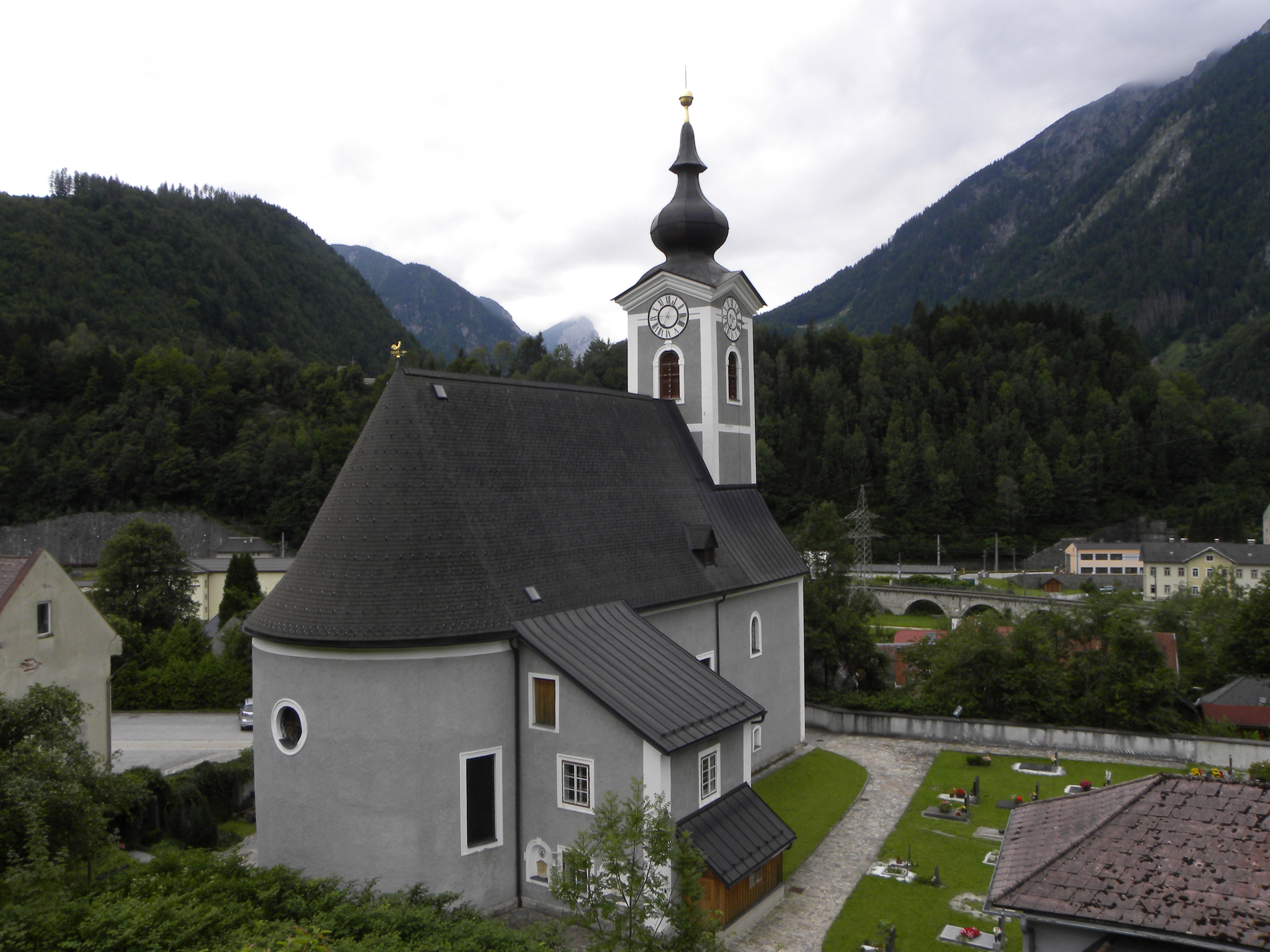 Kath. Pfarrkirche hl. Johannes der Täufer